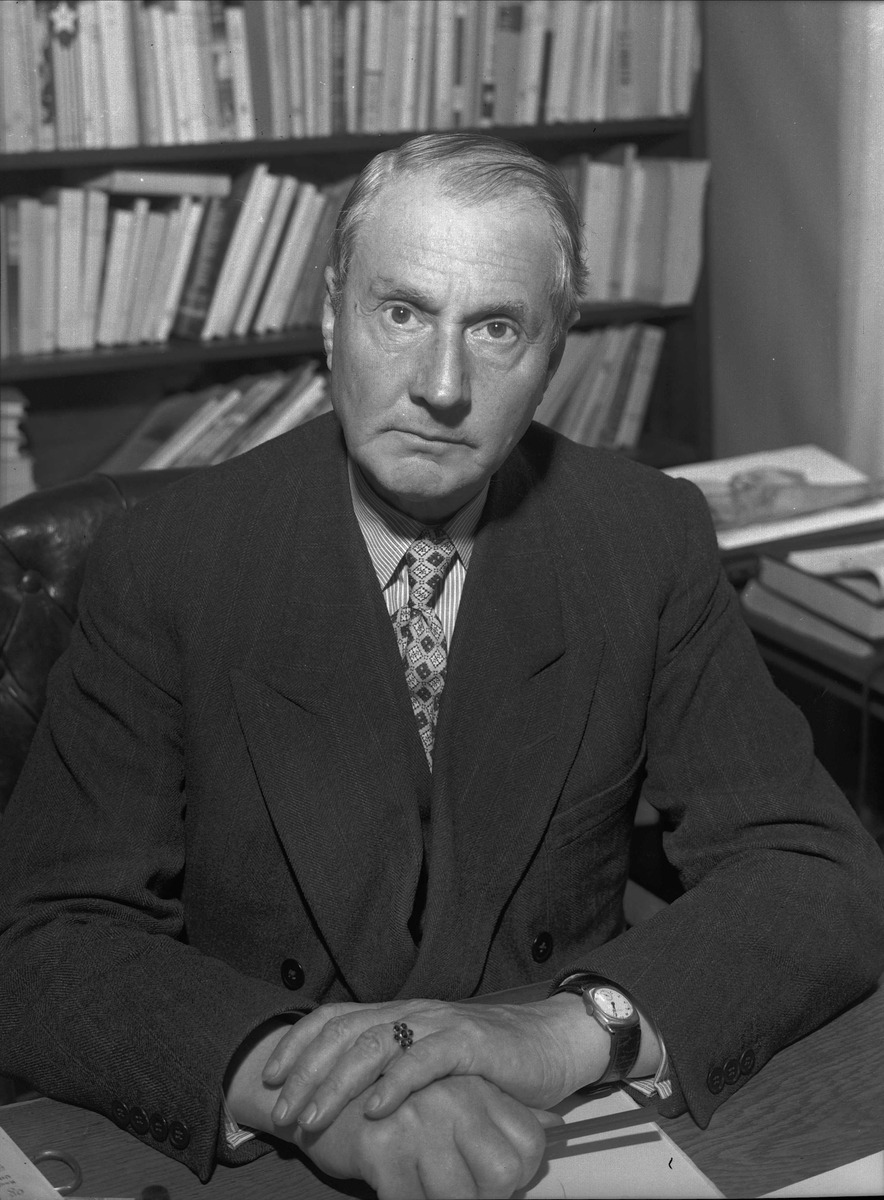 Einar Skavlan (født 30. juli 1882 i Drøbak, død 16. august 1954) var en norsk journalist og teatersjef.